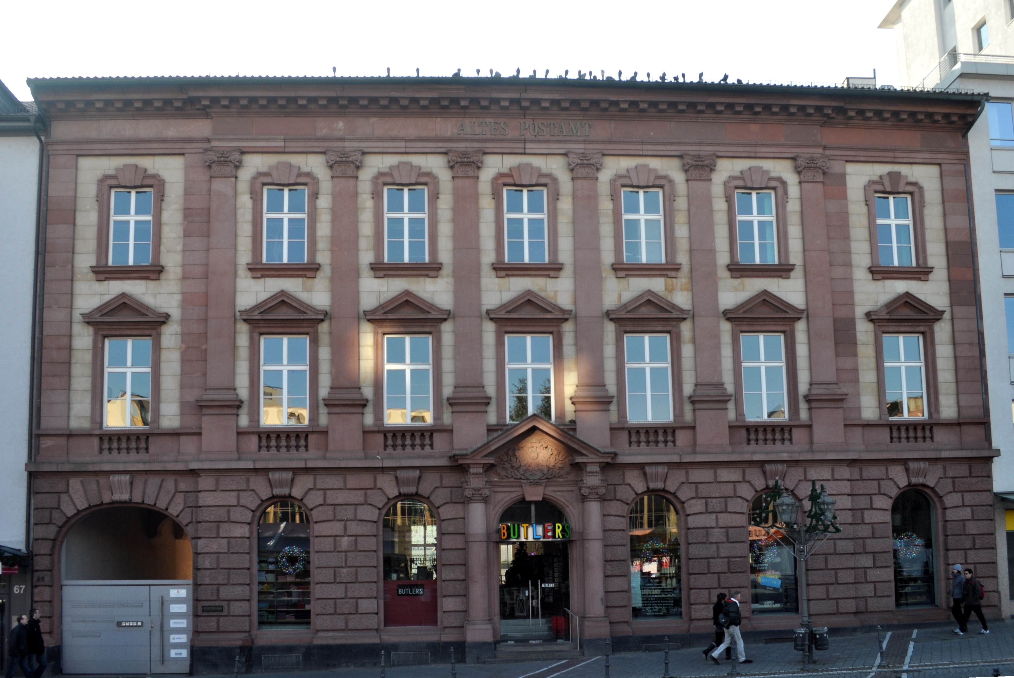 Ehemaliges kaiserliche Postamt, erbaut 1893 mit vom Regierungsbaumeister Max Ludewig entworfener Fassade mit Rustikasockel, Kolossalordnung und Attikazone. Der Dachstuhl wurde durch Bombentreffer im Krieg zerstört und nur behelfsmäig wiederhergestellt. Blieb bis 1972 im Teilbereich Postamt der Deutschen Bundespost. Das denkmalgeschützte Gebäude Louisenstraße 65 in Bad Homburg wird nach einem Eigentümerwechsel seit 2016 aufwendig saniert, einschließlich einer Rekonstruktion des historischen Dachgeschosses.